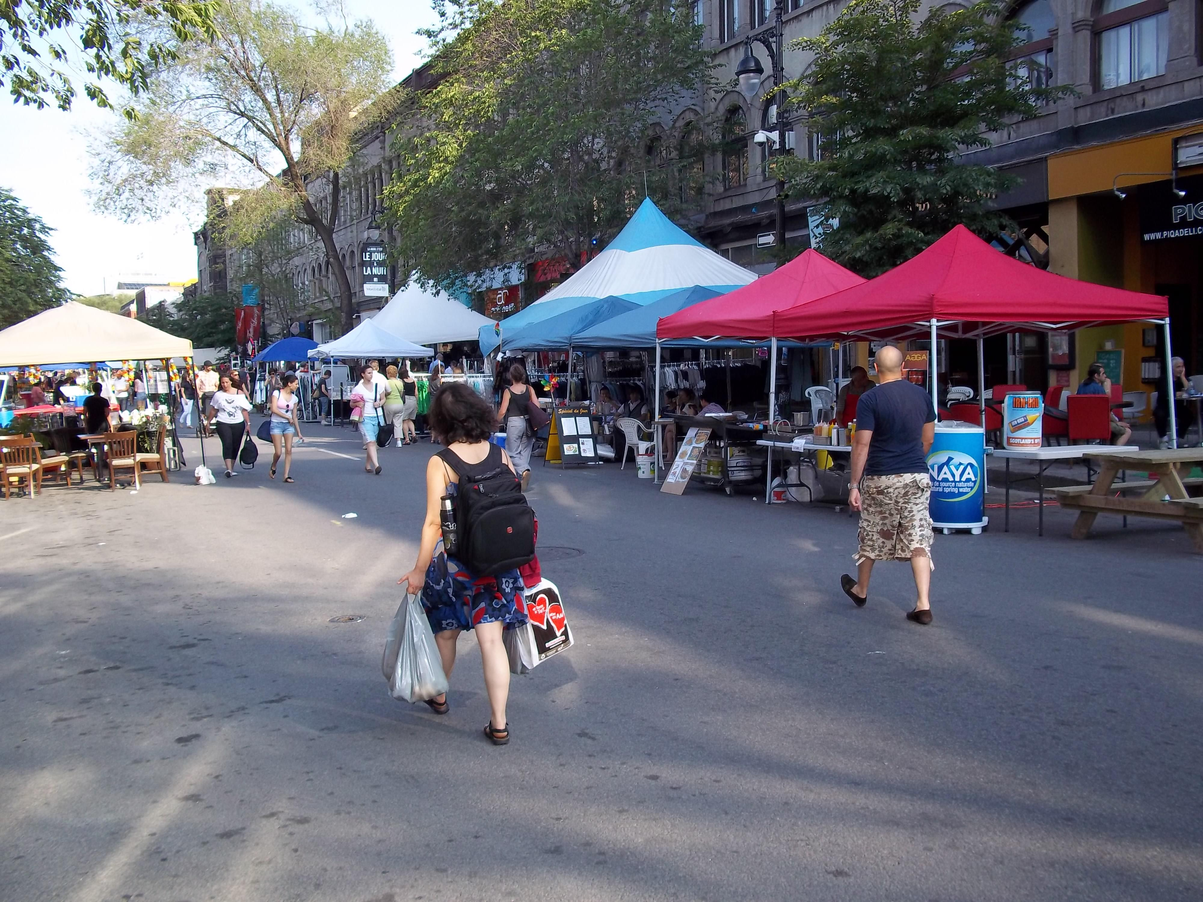 Boulevard Saint-Laurent, réservé aux piétons, Montréal